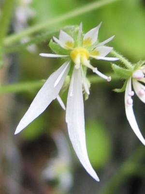 Image:ハルユキノシタ.JPGの拡大画像。2,006年5月4日、利用者自身の撮影、編集。